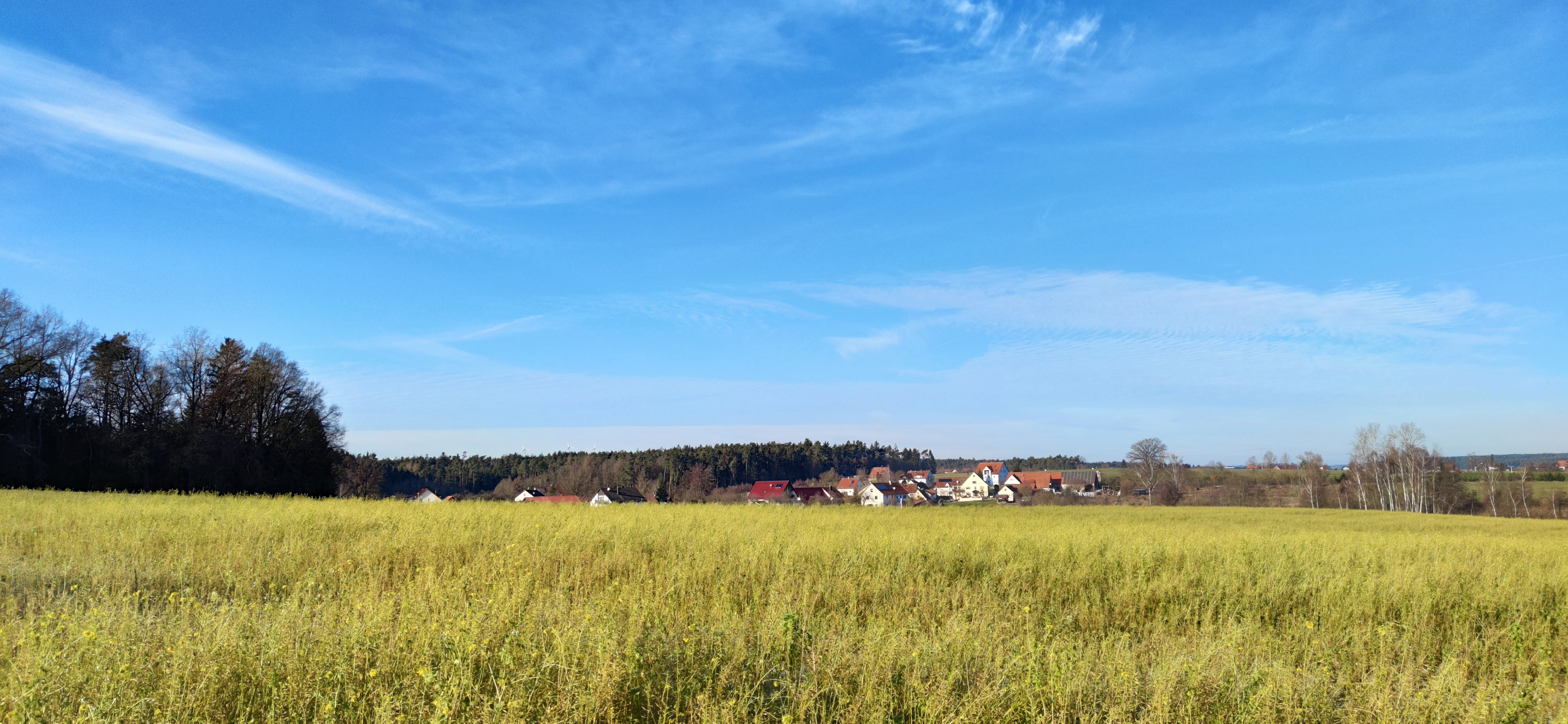 Hirschbach mit Rappenbuck. Rechts im Hintergrund Dürrwangen.